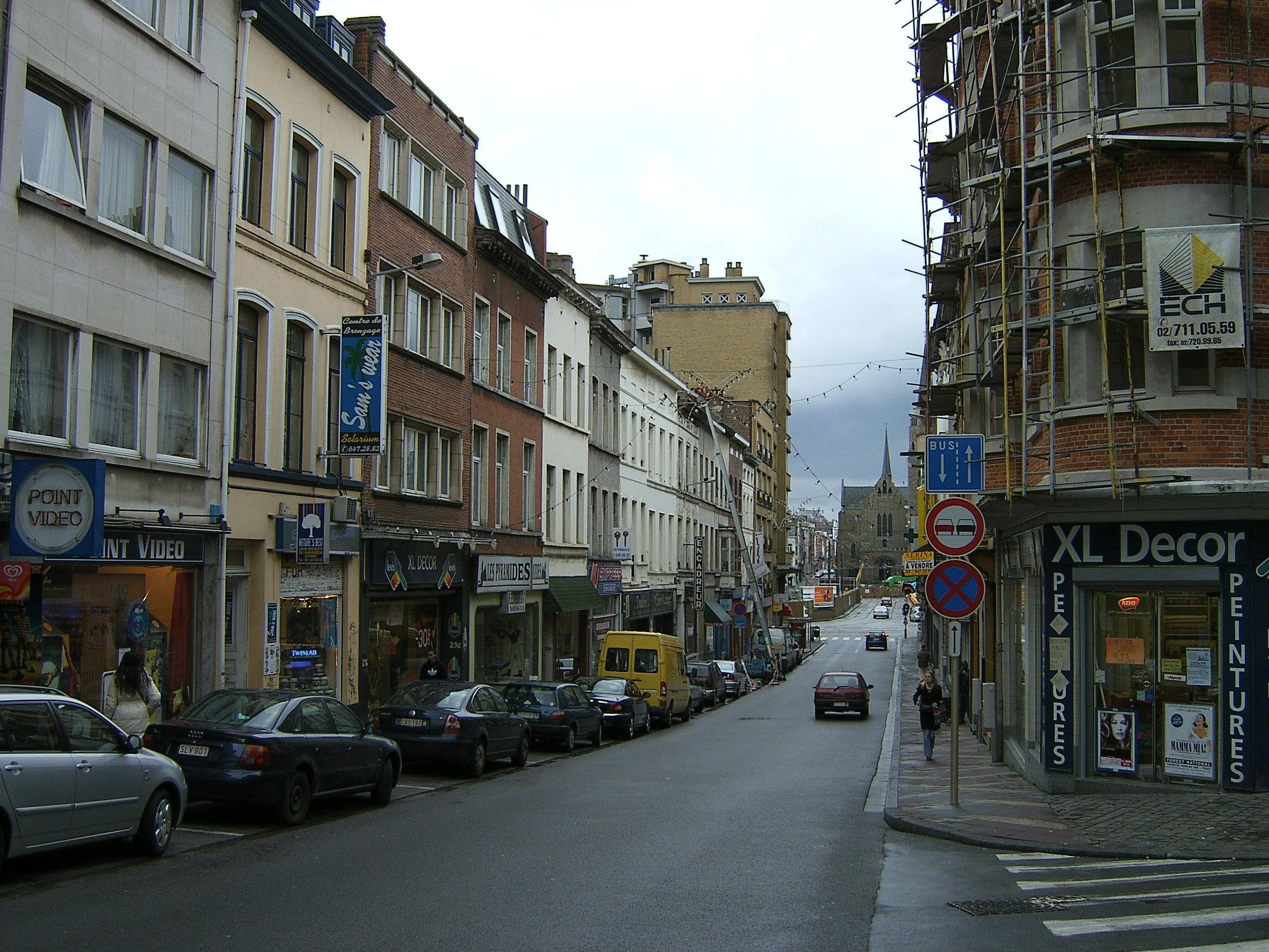 eigen werk Ruben Alexander